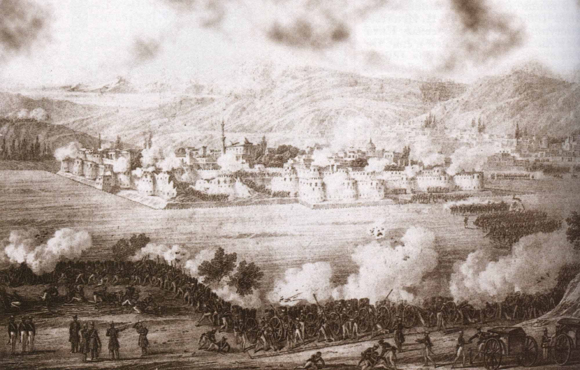 Взятие Эривани 1827 год